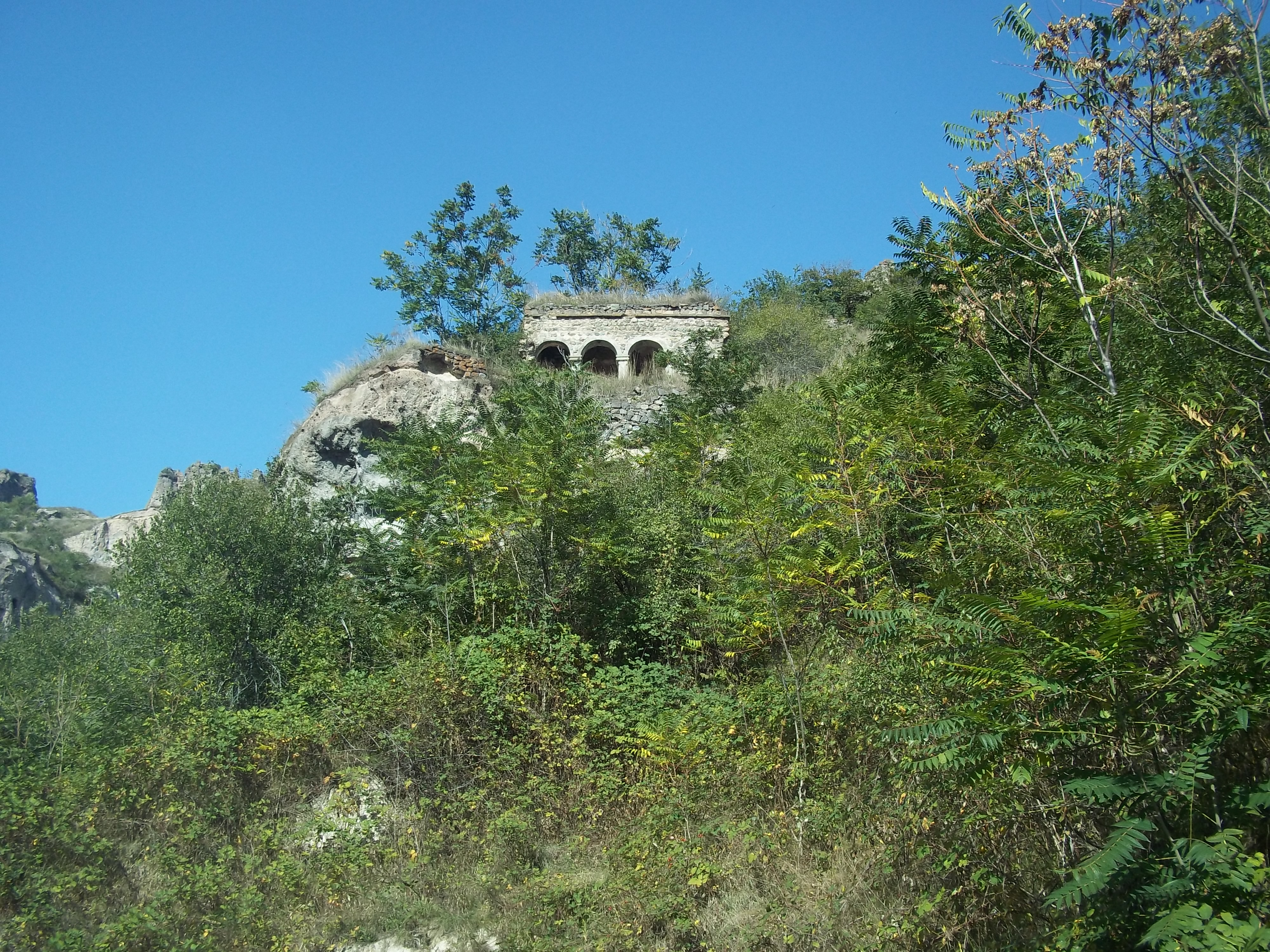 Մելիք Քասու ապարանքը Հին Խնձորեսկում 45/5.12.1